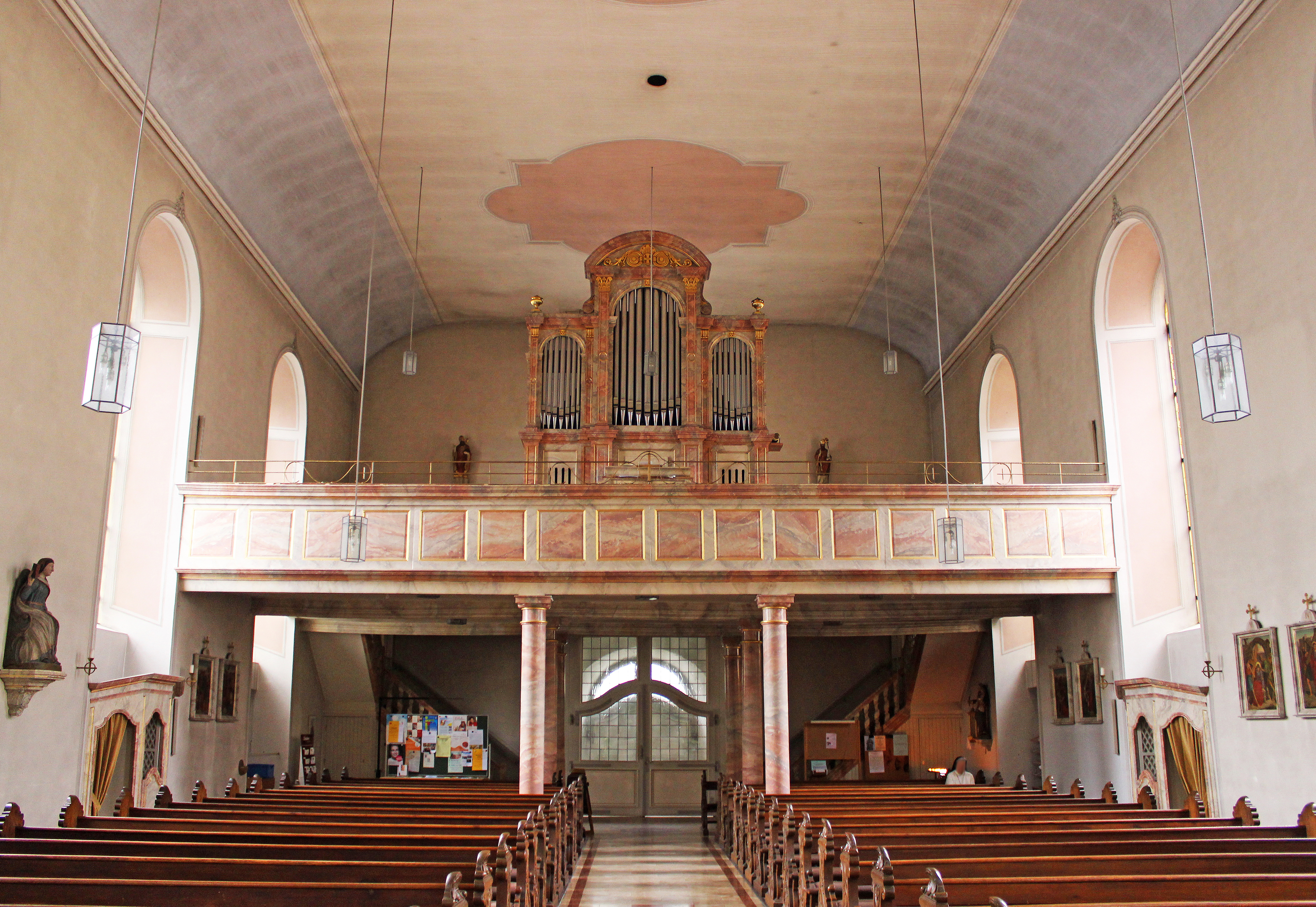 Innenansicht der katholischen Kirche St. Engelbert in St. Ingbert, Saarland